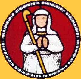 Darstellung einer Äbtissin nach den Kirchenfenstern der Stiftskirche Gernrode